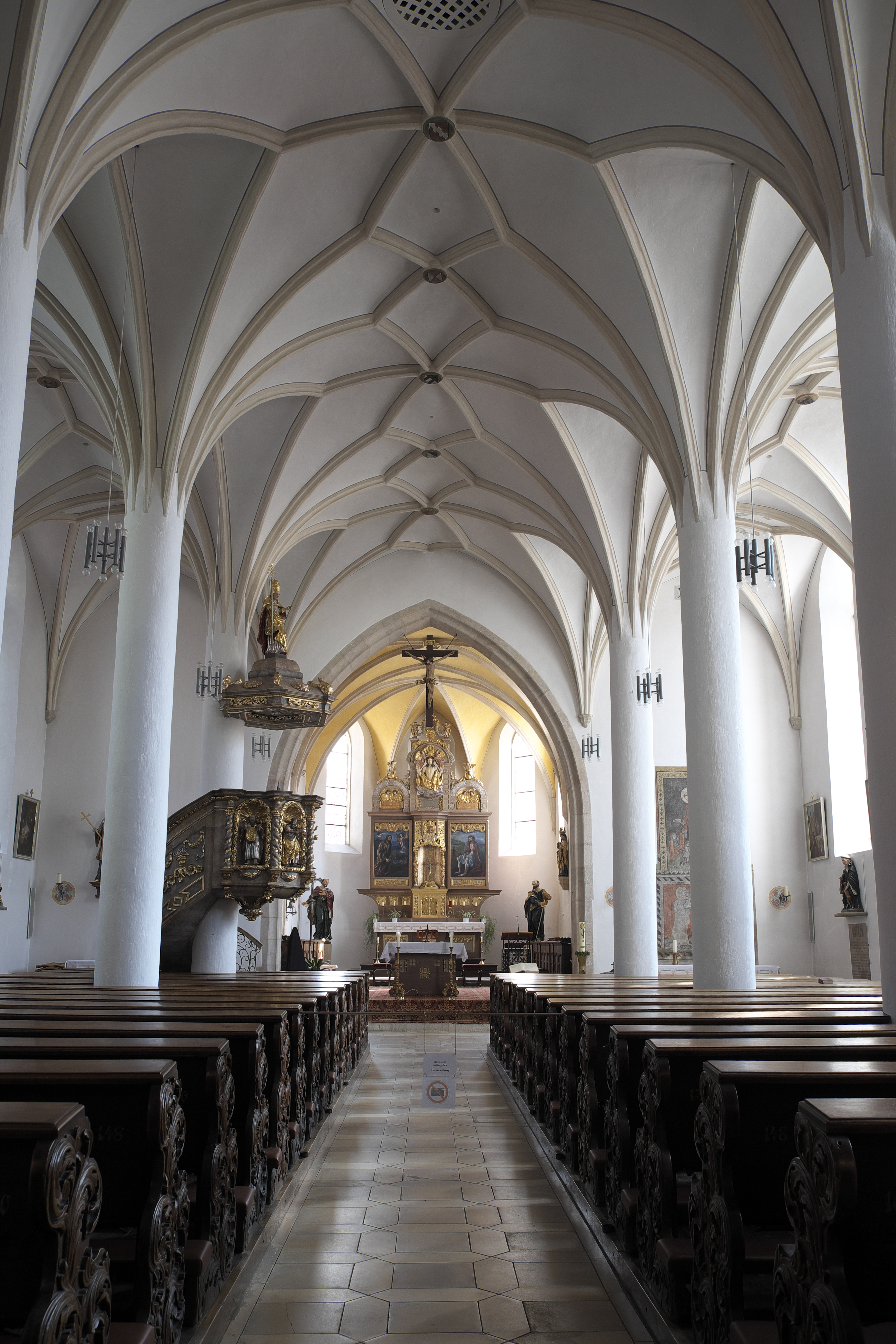 Katholische Pfarrkirche St. Barbara in Abensberg im Landkreis Kelheim in Niederbayern (Bayern), Innenraum